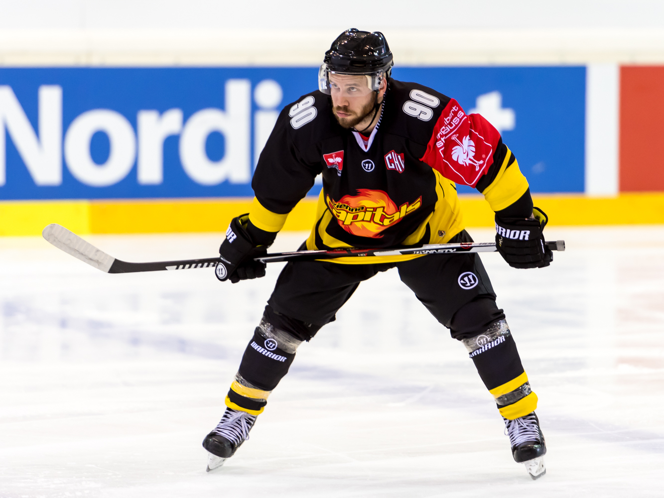 Champions Hockey League - Vienna Capitals vs Skelleftea AIK am 18.08.2016. Bild zeigt Kelsey Tessier (VIC).